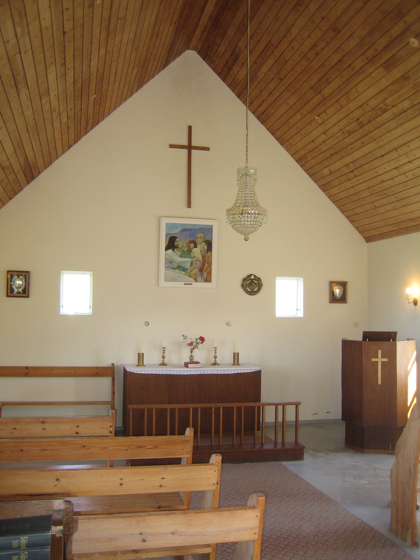 Efranúpskirkja í Miðfirði að innan